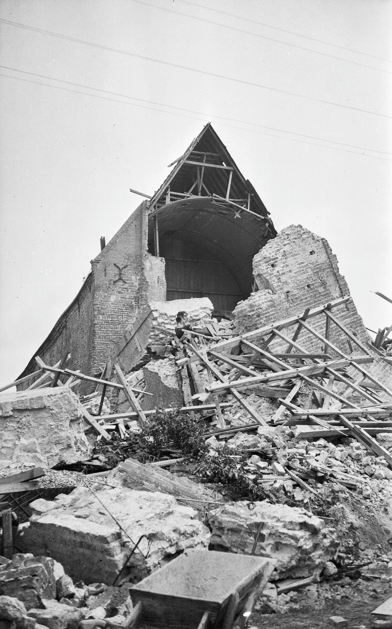 Nederlands Hervormde Kerk: Toren na instorting